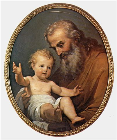 quadro di San Giuseppe (padre putativo di Gesù). Immagine liberamente concessa dalla Congregazione di San Giuseppe e liberamente utilizzabile